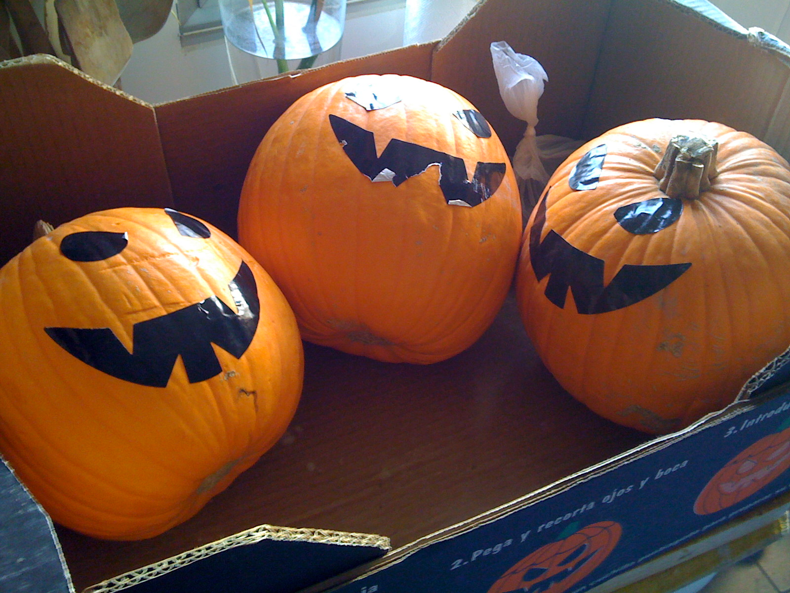 Las calabazas de corporativas de Linking Paths y jositajosi que nos llegan de mano de Kernel Export... que nombre tan apropiado XD....